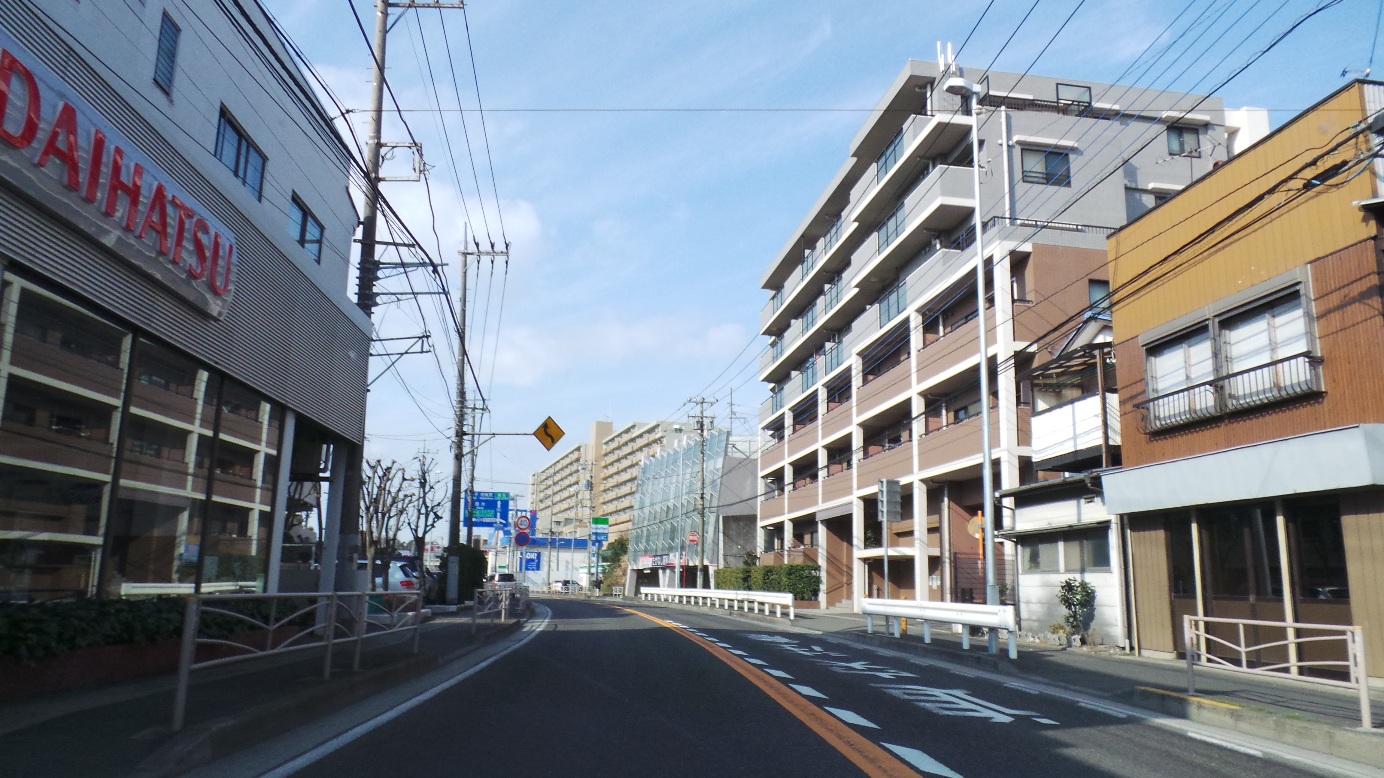 3 Chome Shirane, Asahi-ku, Yokohama-shi, Kanagawa-ken 241-0005, Japan